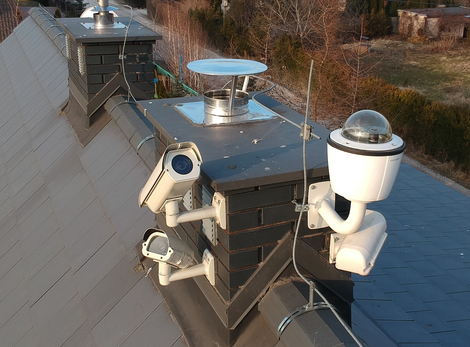 Stacja bolidowa PFN63 Starowa Góra. Operator: A. Raj